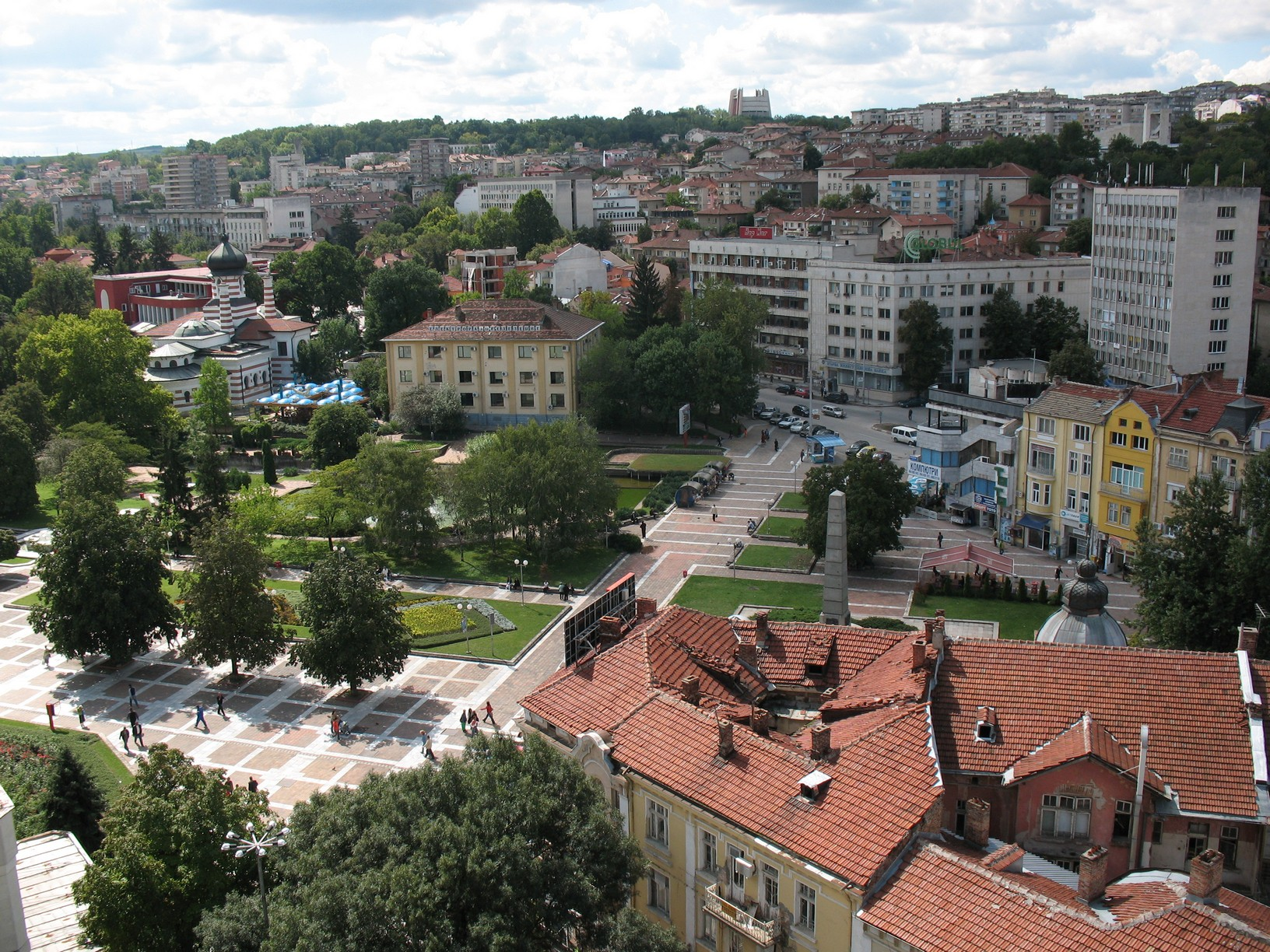 View from "Rostov", Pleven